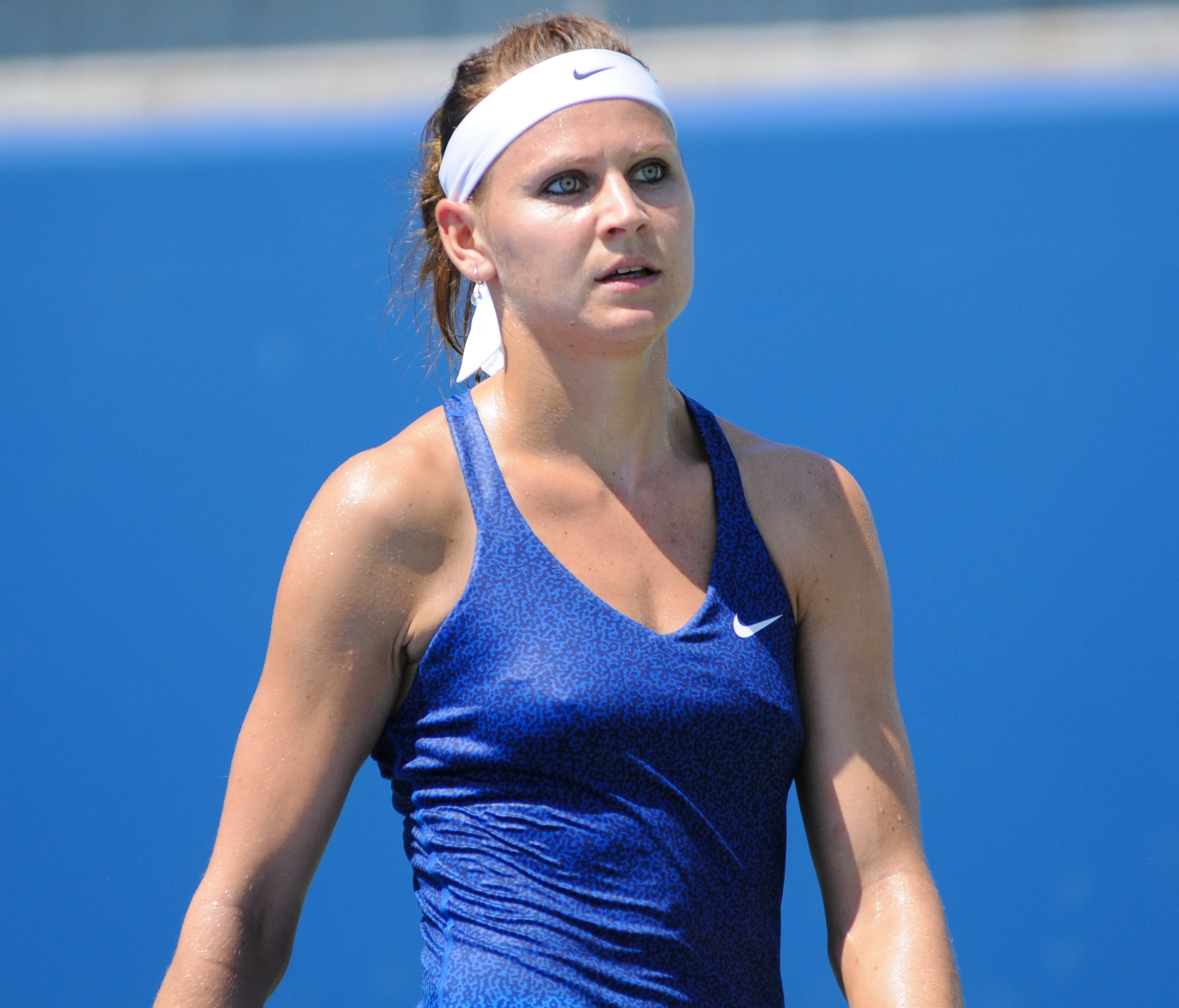 US Open 2014